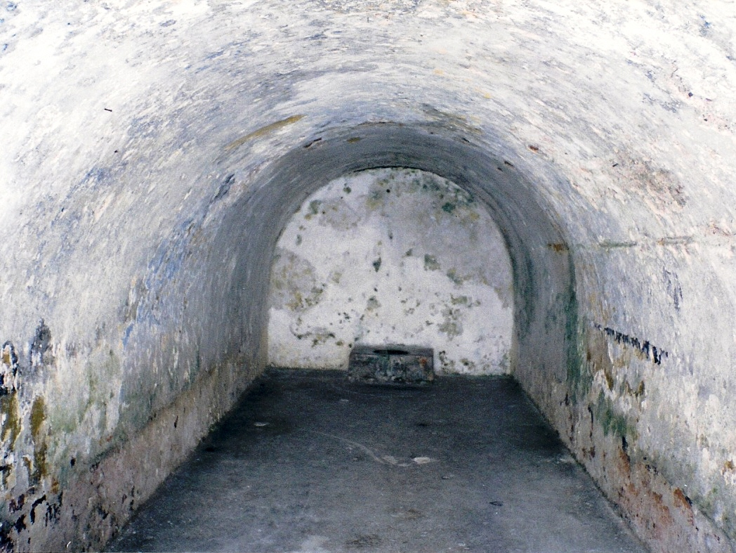 Fortaleza de Santa Cruz da Barra, Niterói, RJ, Brasil: aspecto de uma das antigas celas.